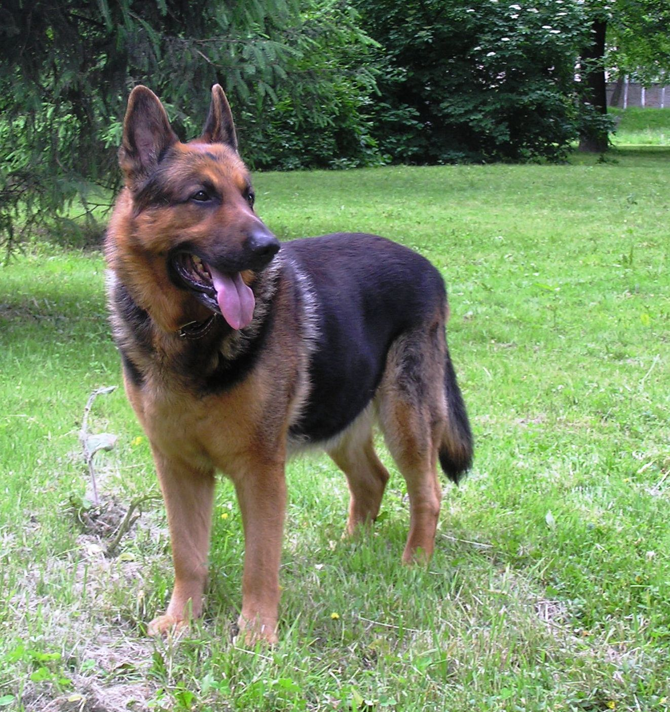 Aksel na spacerze